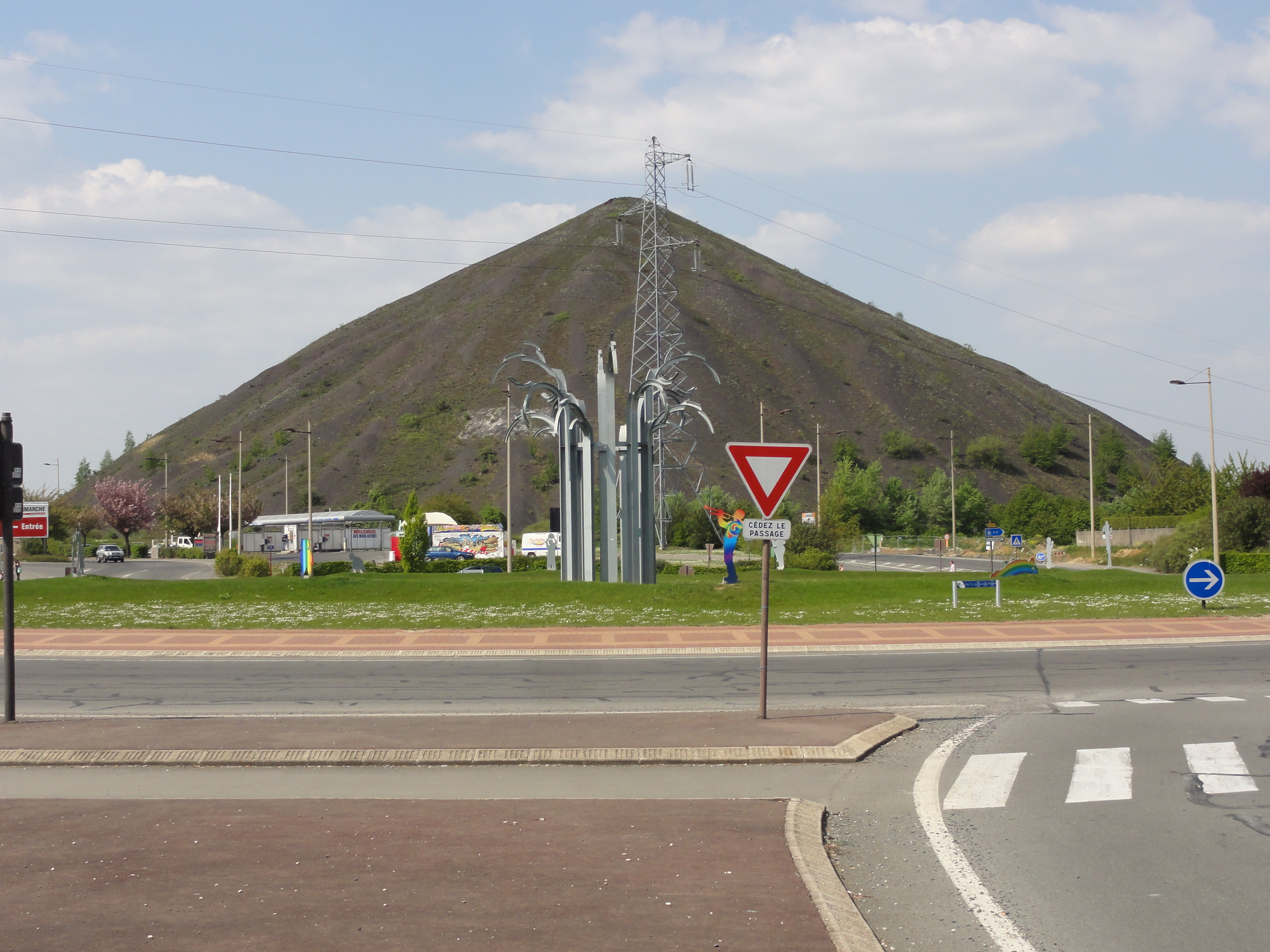 Terril n° 97 dit 4 - 5 Sud de Drocourt, fosse n° 4 - 5 de la Compagnie des mines de Drocourt dans le bassin minier du Nord-Pas-de-Calais, Méricourt, Pas-de-Calais, Nord-Pas-de-Calais, France.